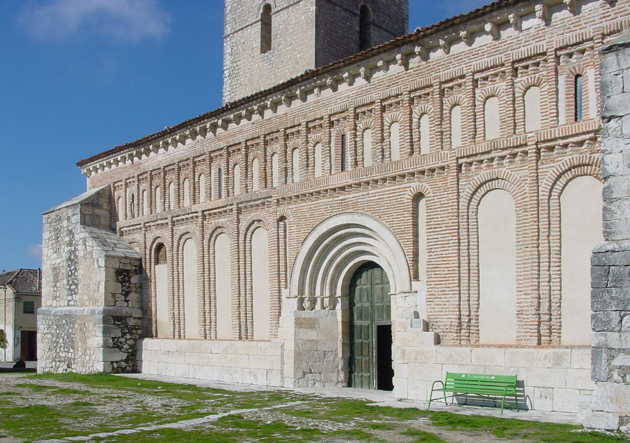 Iglesia mudéjar de San Andrés de Cuéllar (Segovia España). Autor de la imagen: Lourdes Cardenal, noviembre de 2005.